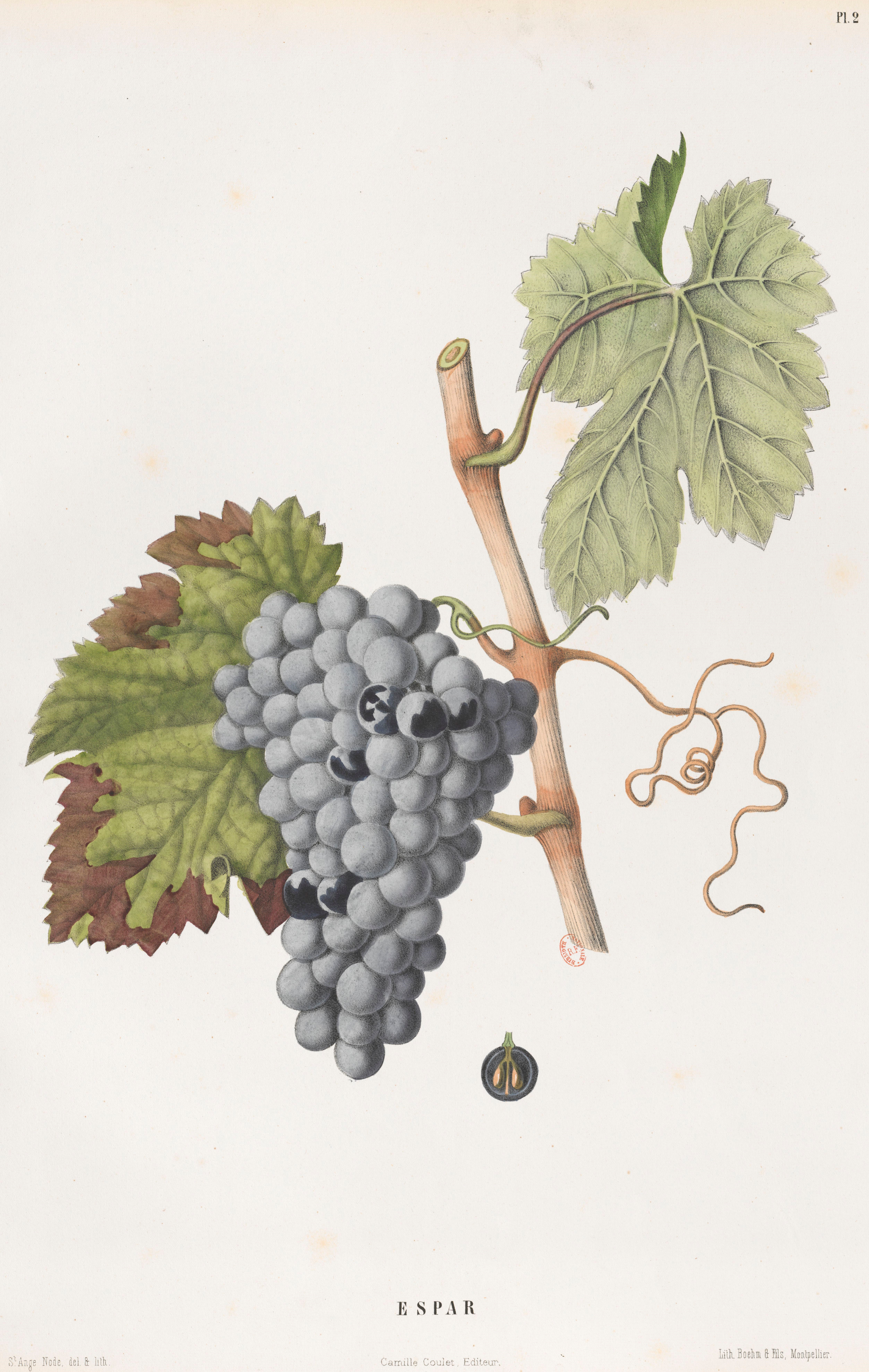 Lithographie du cépage Espar (ou Mourvèdre)